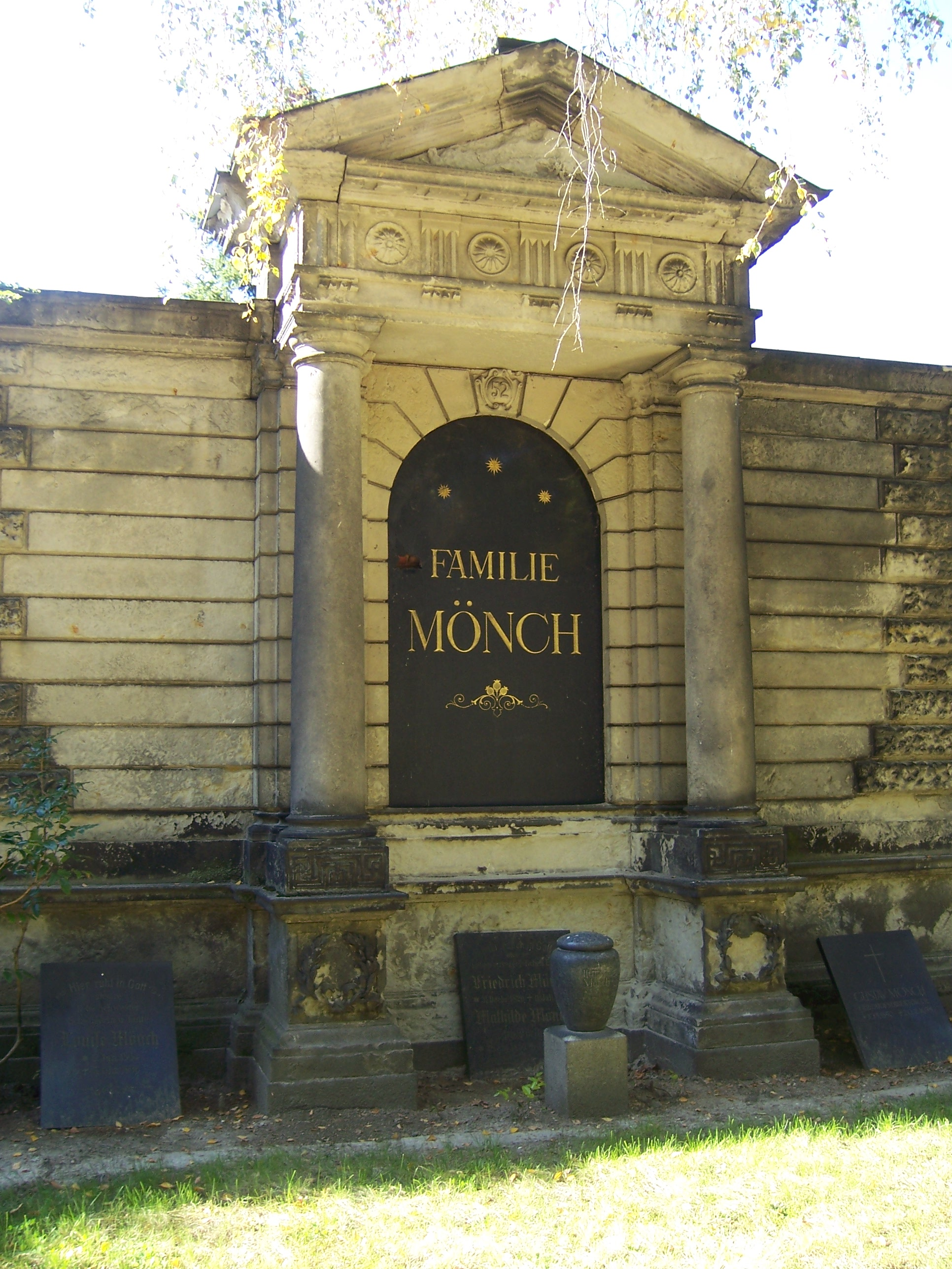 Grabstätte Gustav Mönch, Wandstelle Südfriedhof Leipzig, erster Friedhofsdirektor